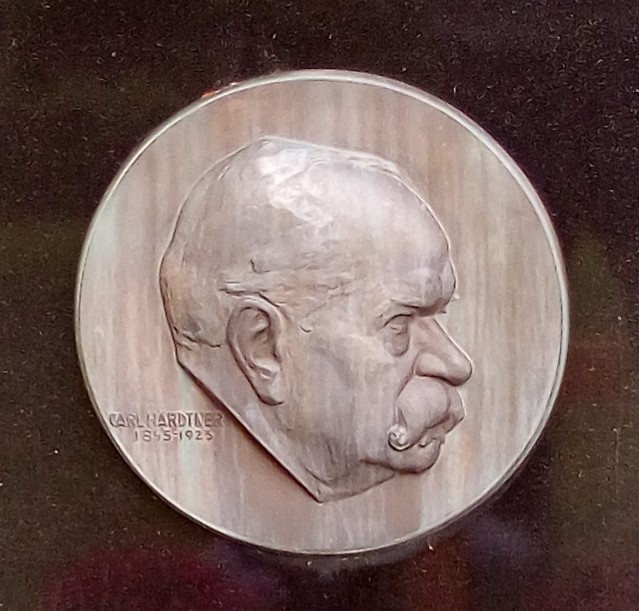 Porträt Carl Härdtners (1845–1923) auf dessen Grabstele auf dem Friedhof Locherhof